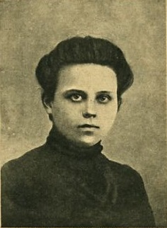 Zinaida Vasil'evna Konopljannikova (1878-1906)